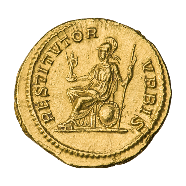 Ауреус. Септимий Север. Ок. 202—210 гг. (реверс). Надпись RESTITVTOR VRBIS. Рома (богиня-покровительница Рима) сидит на троне без спинки, влево; в руках держит Палладий (древнее изображение богини Афины Паллады) и скипетр; внизу, у трона, щит.